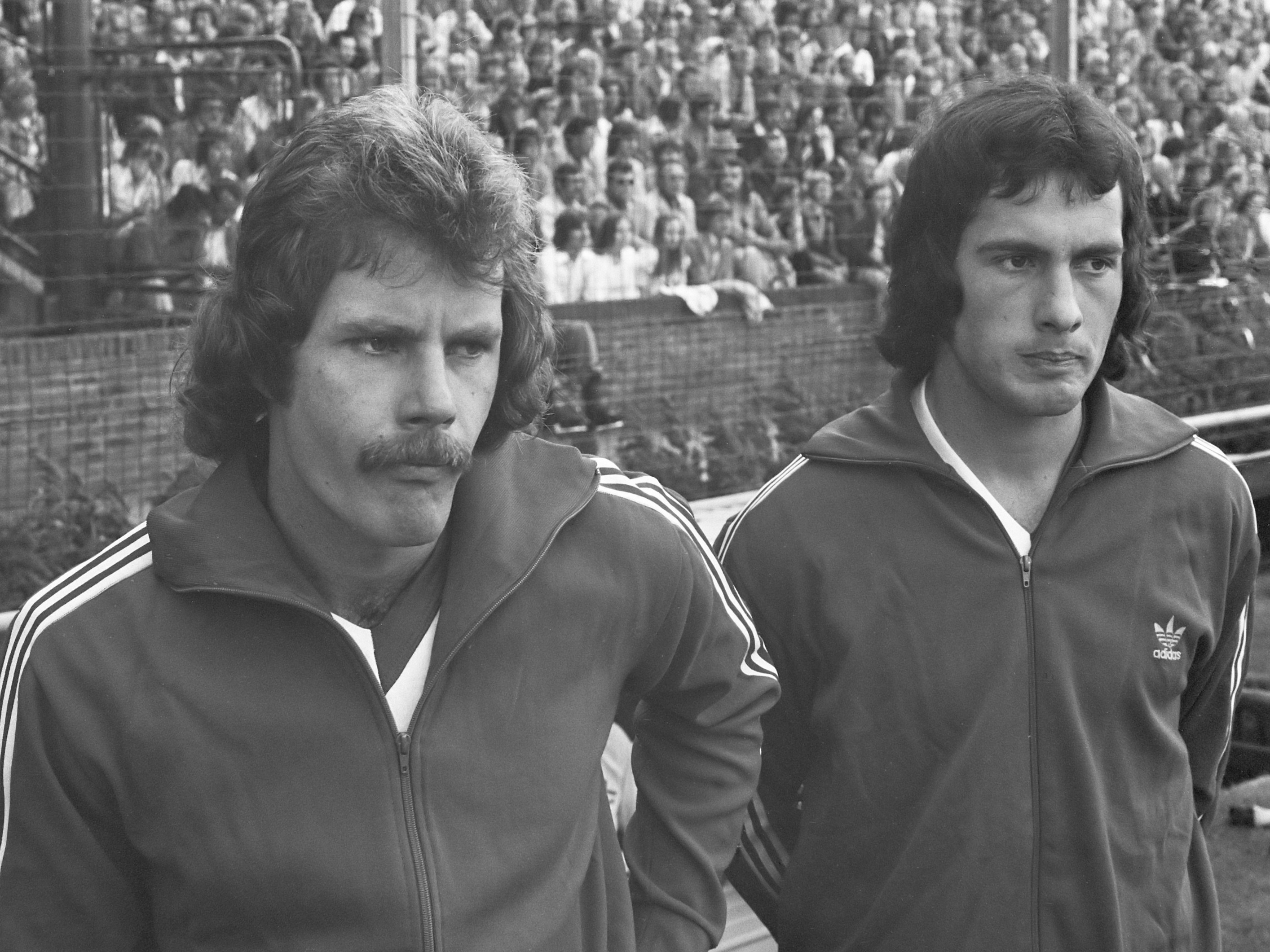 Oefenwedstrijd; Vitesse tegen Feijenoord. Geoffrey Wegerle (l) en Steve Wegerle